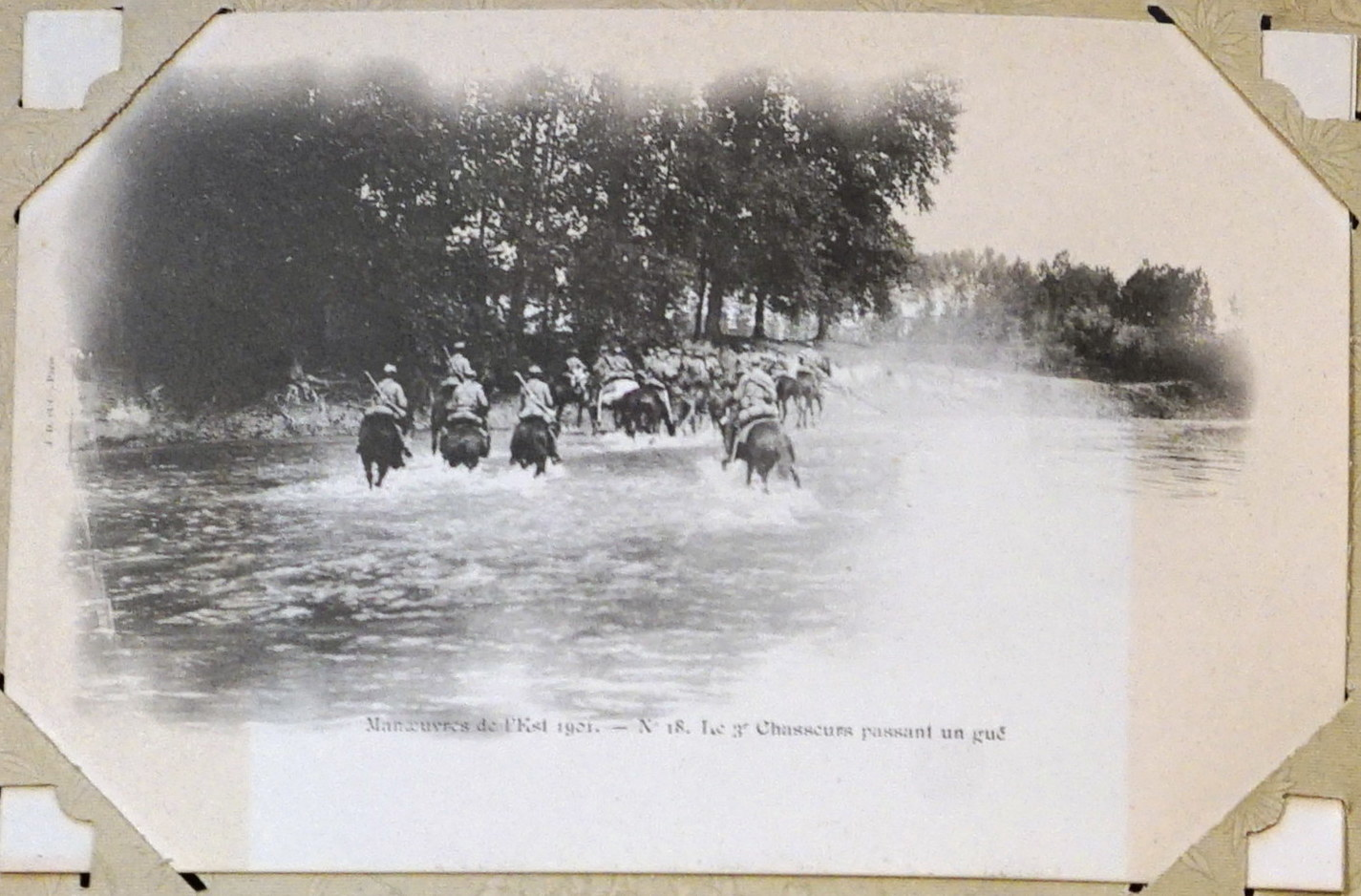 conservé en la B.M. de Reims.